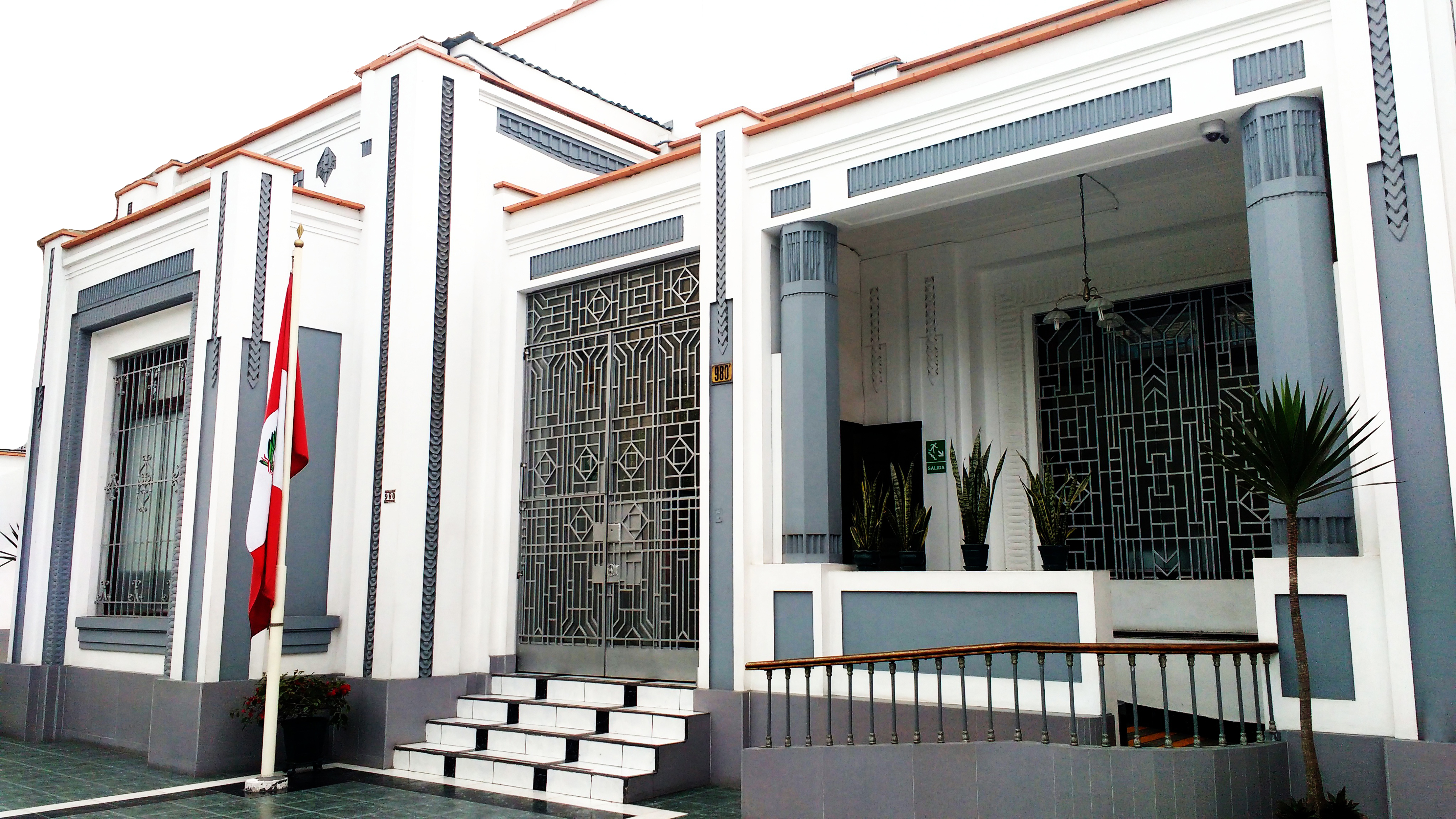 Tribunal Superior de Responsabilidades Administrativas